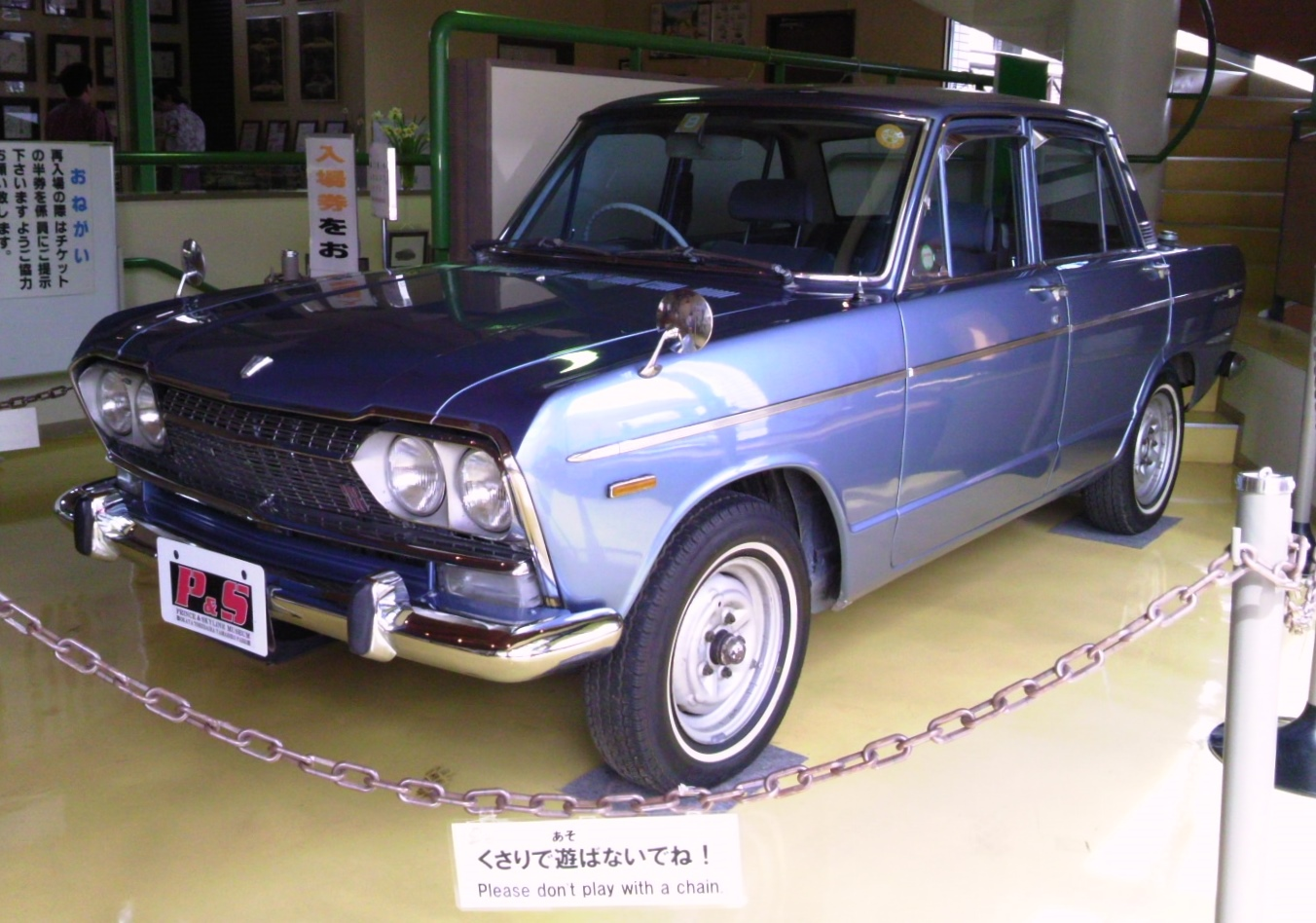 ニッサン・プリンス・スカイライン1500デラックス（S57D型）